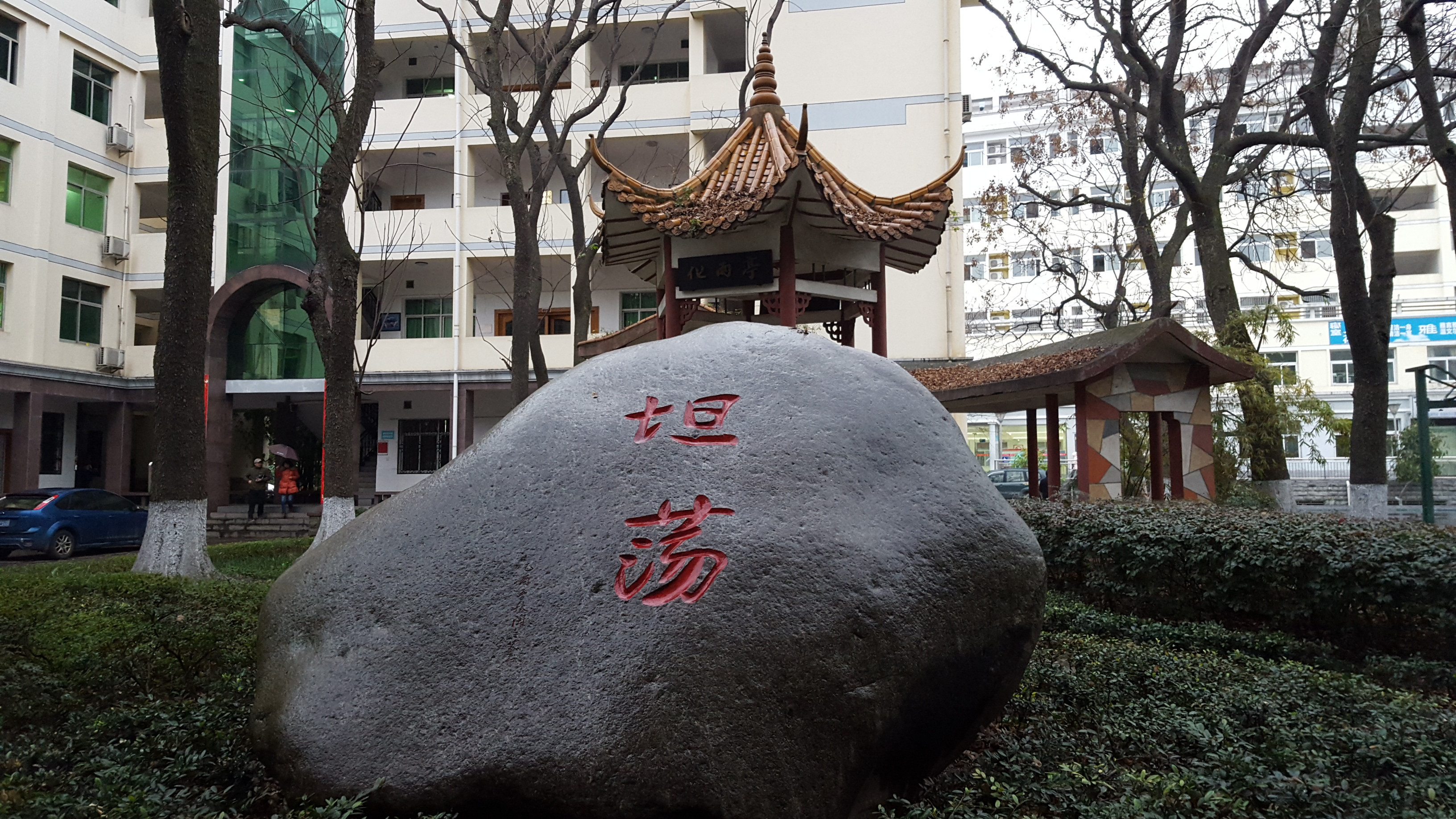 中文（中国大陆）: 宜昌一中坦荡石